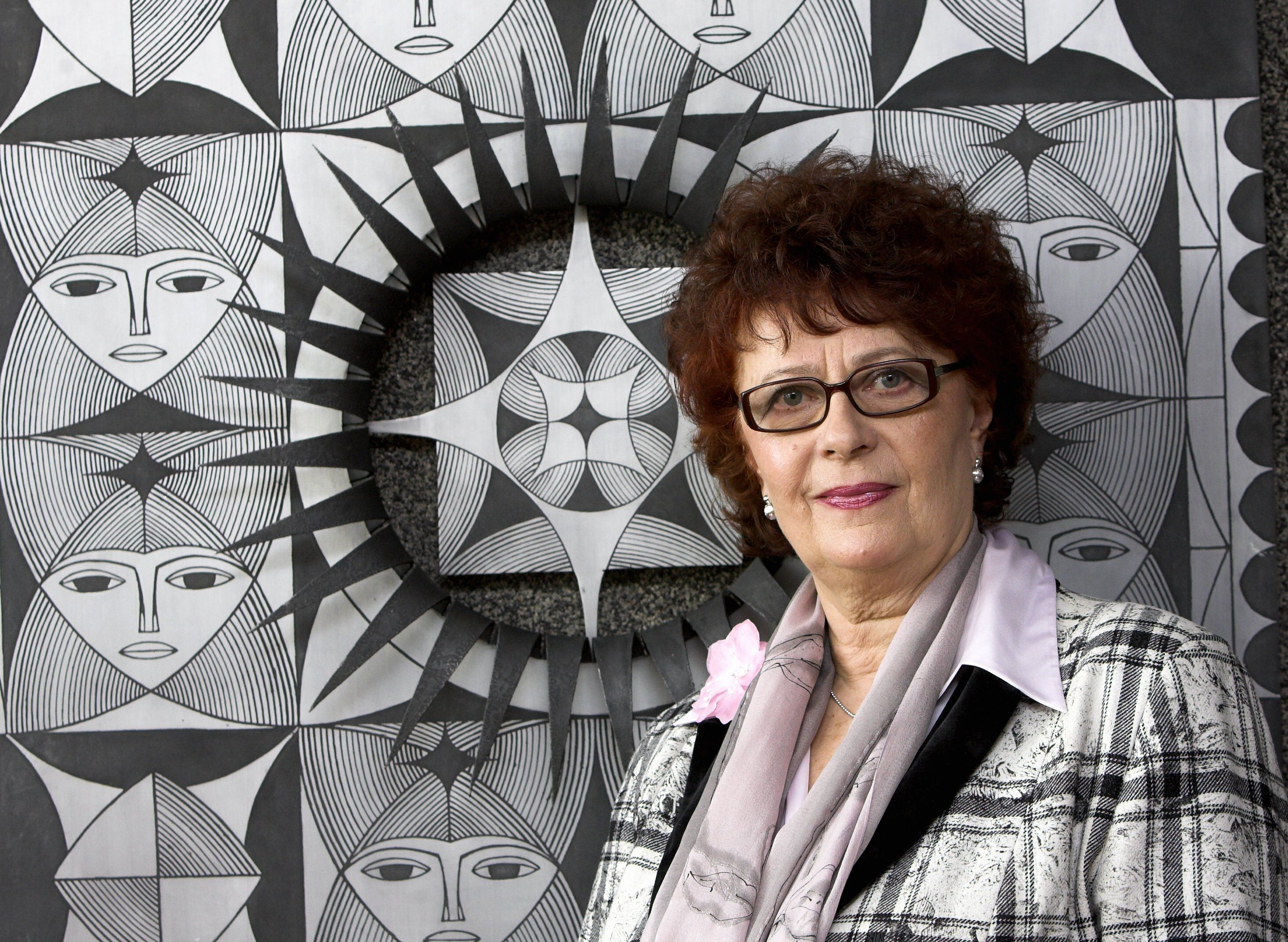 Anne Erm raadiomajas 2006. aastal.